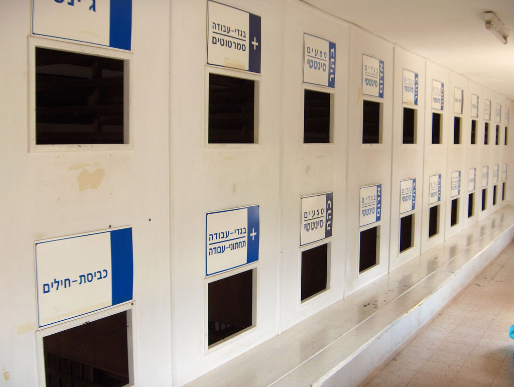 Laundry Room, Kibbutz Eilon